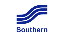 Logo de Southern Airways